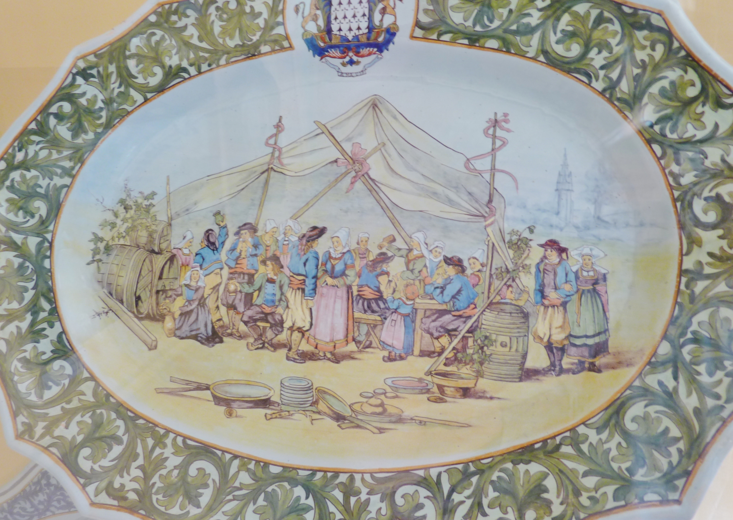 Alfred Beau : plat avec décor de noce bretonne (manoir de Kerazan, fondation Astor)